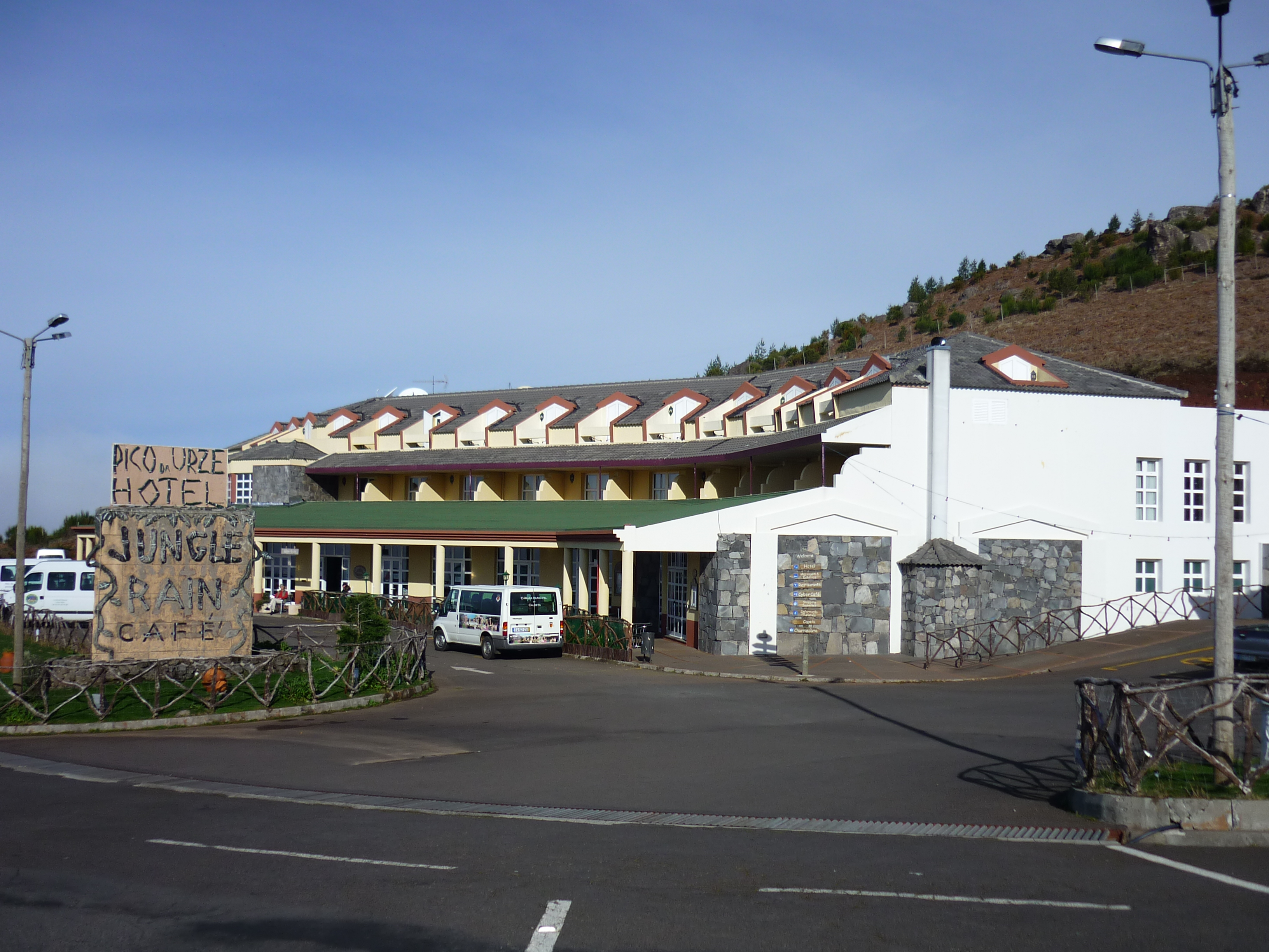 Pico da Urze hotel (Funchal, Madeira)